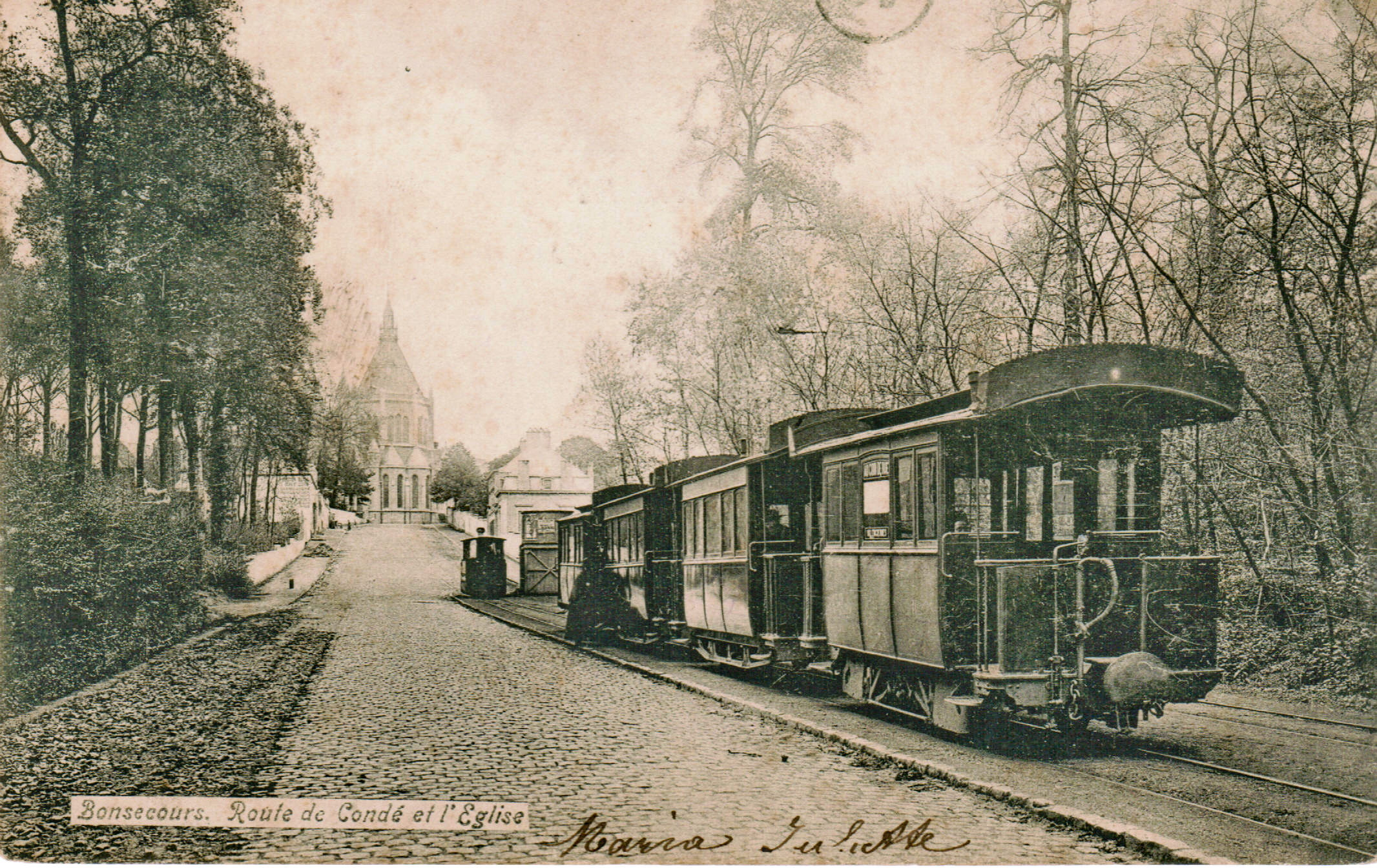 Carte postale ancienne, sans mention d'éditeurBONSECOURS - Route de Condé et l'EgliseGros plan du tramway de Valenciennes, avec, au fonds, sa locomotive à vapeur bicabine en cours de manoeuvre